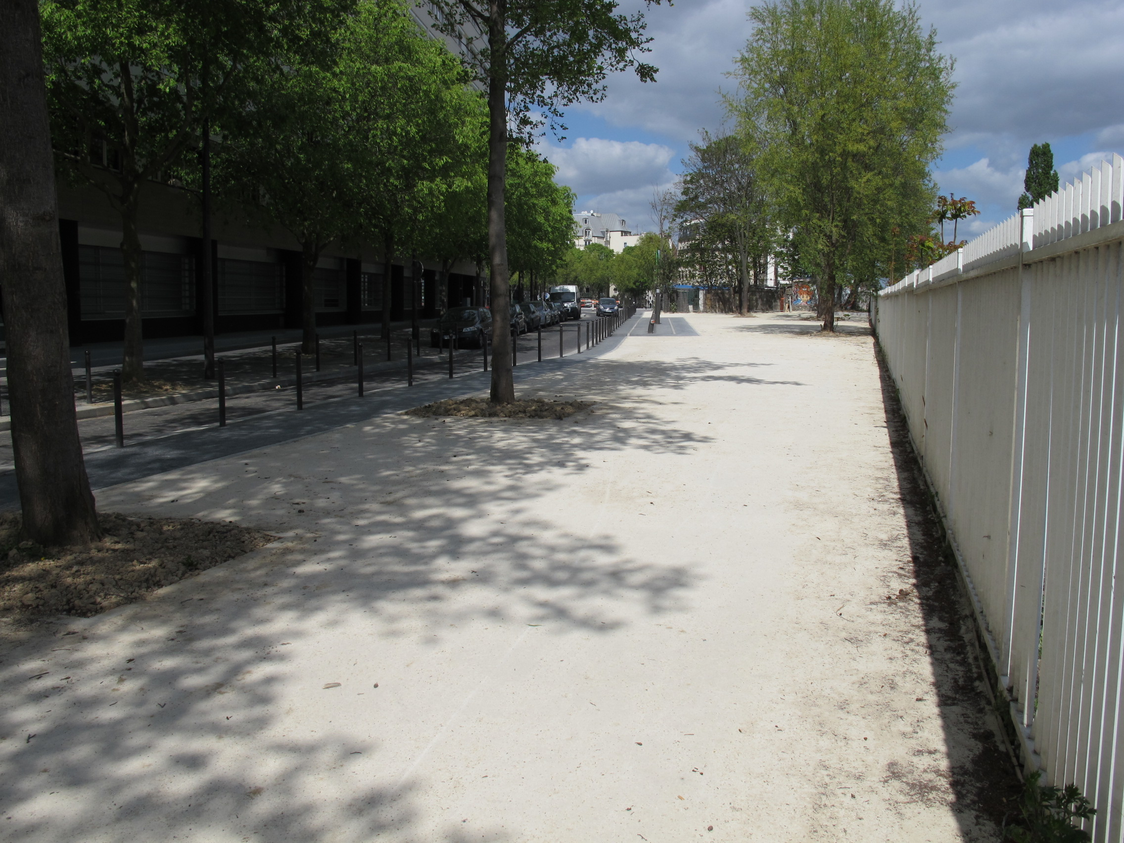 Quai de Metz, Paris